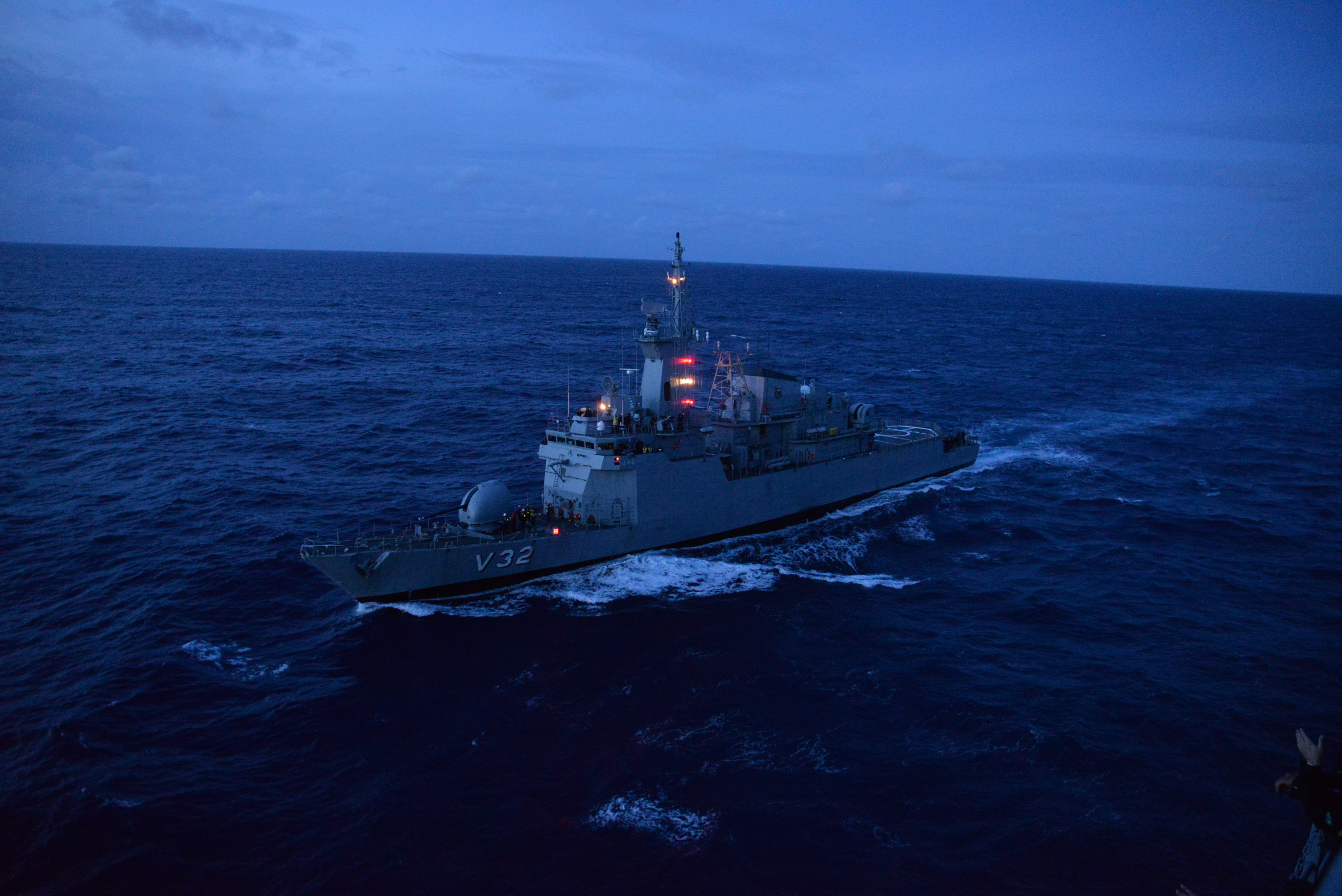 Corveta Júlio de Noronha (V-32) Arquivo liberado pela Marinha do Brasil através de projeto GLAM com Wiki Educação Brasil